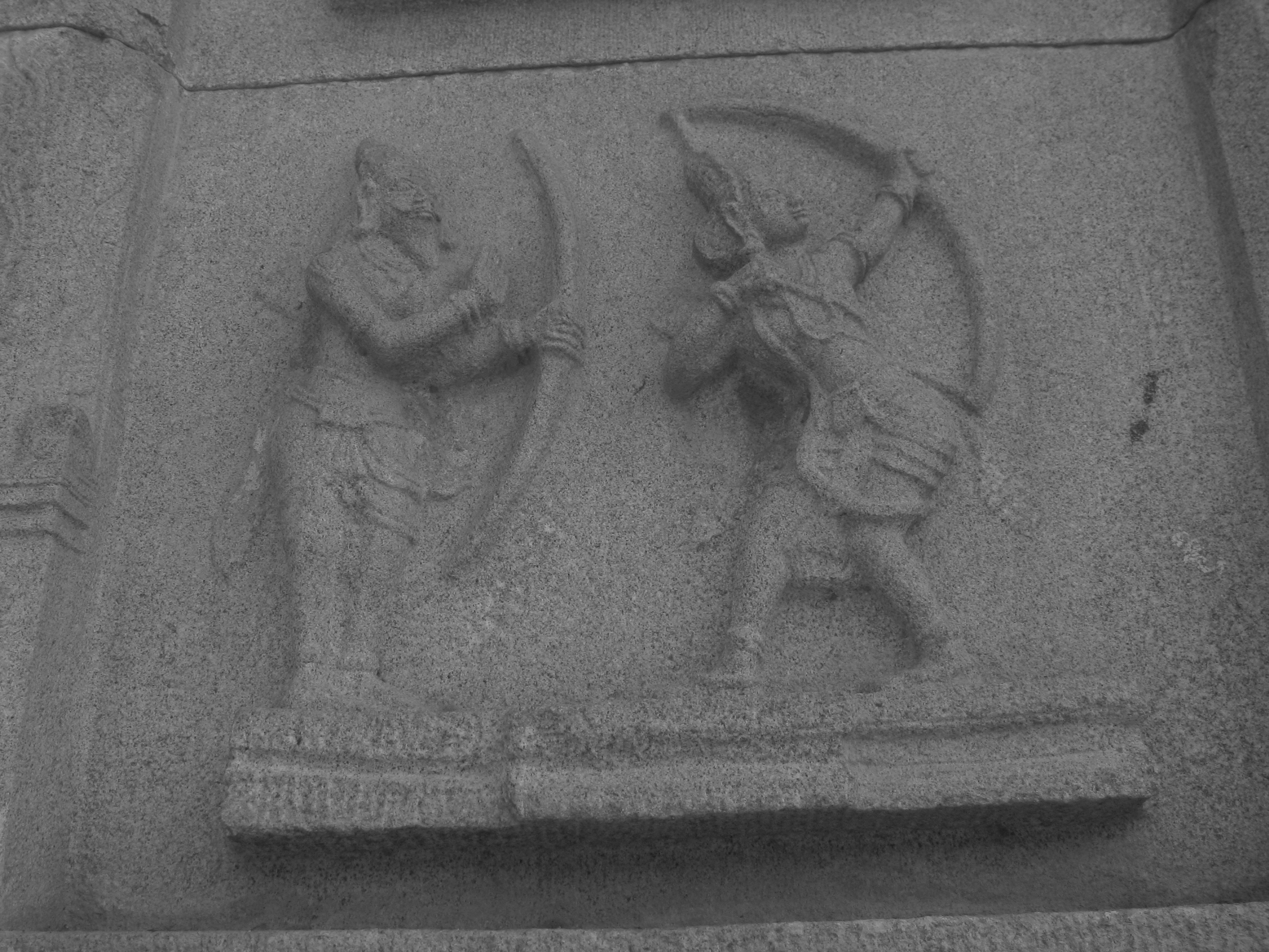 Ram and Prashurama, Hampi, India